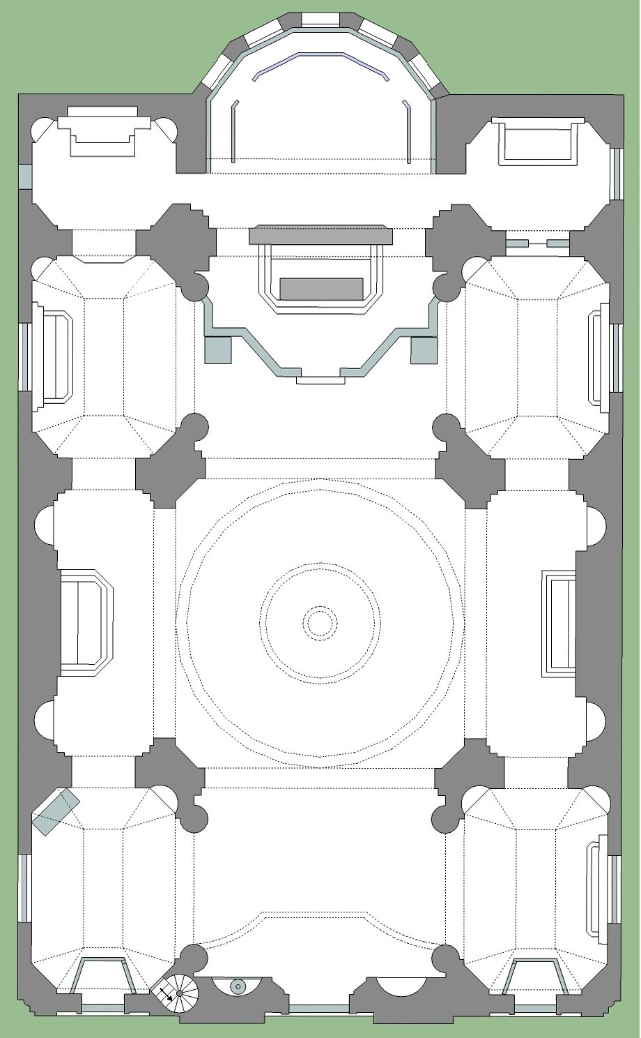 Pianta della Collegiata Santissima Maria Assunta